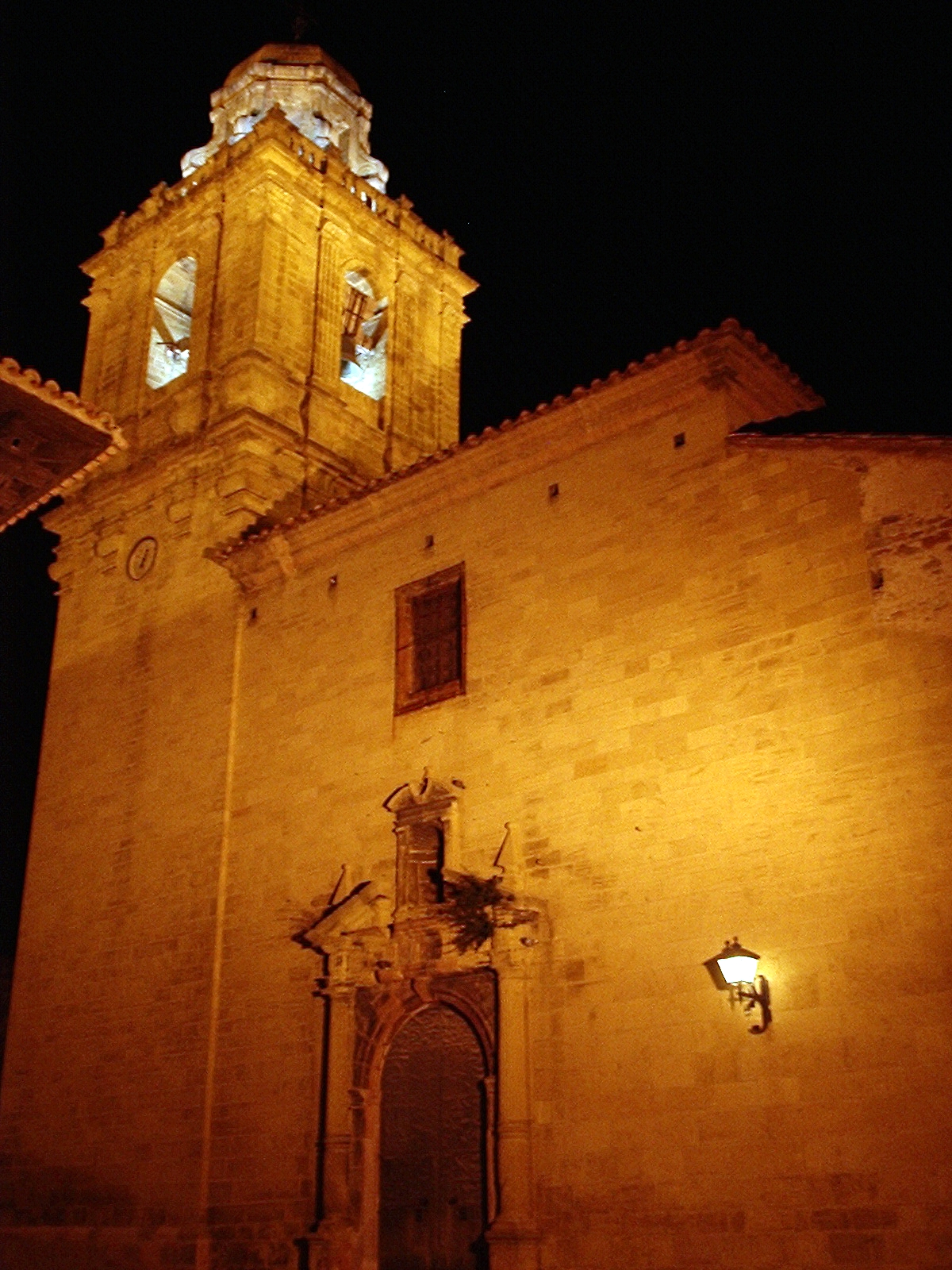 Church in Mirambel, Teruel. Iglesia de Mirambel, en el Maestrazgo, Teruel. Esta foto participó en el juego En un Lugar de Flickr .